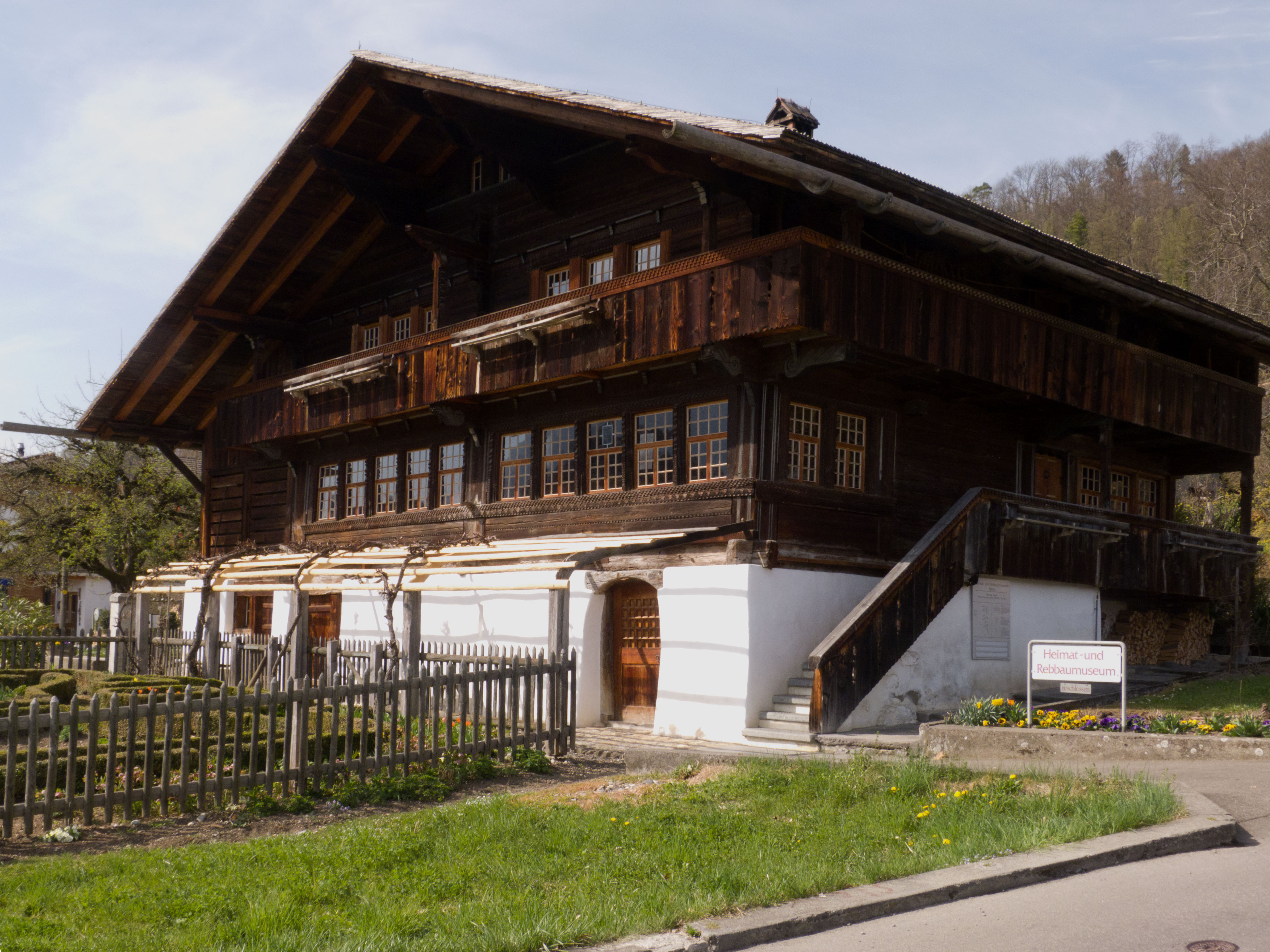 Ehemaliges Winzerhaus, heute Heimat- und Rebbaumuseum Spiez